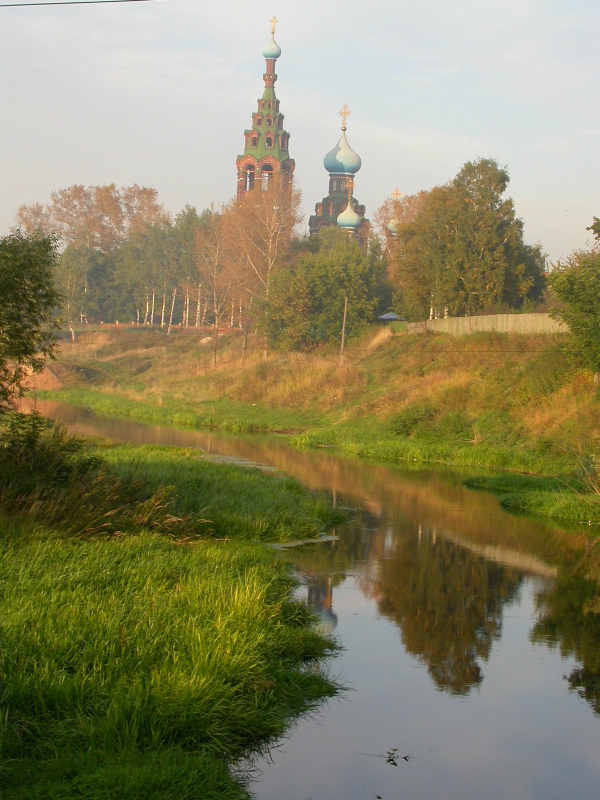 Церковь в Черкизово 1903г